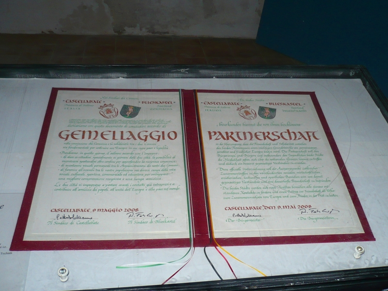 I documenti che sanciscono il gemellaggio tra il comune di Castellabate e quello tedesco di Blieskastel.